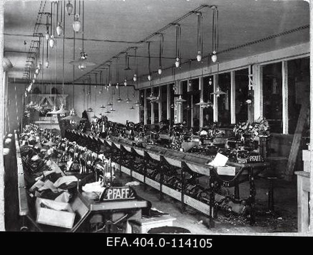 Швейный цех обувной фабрики "Унион", Таллин, 1925 год